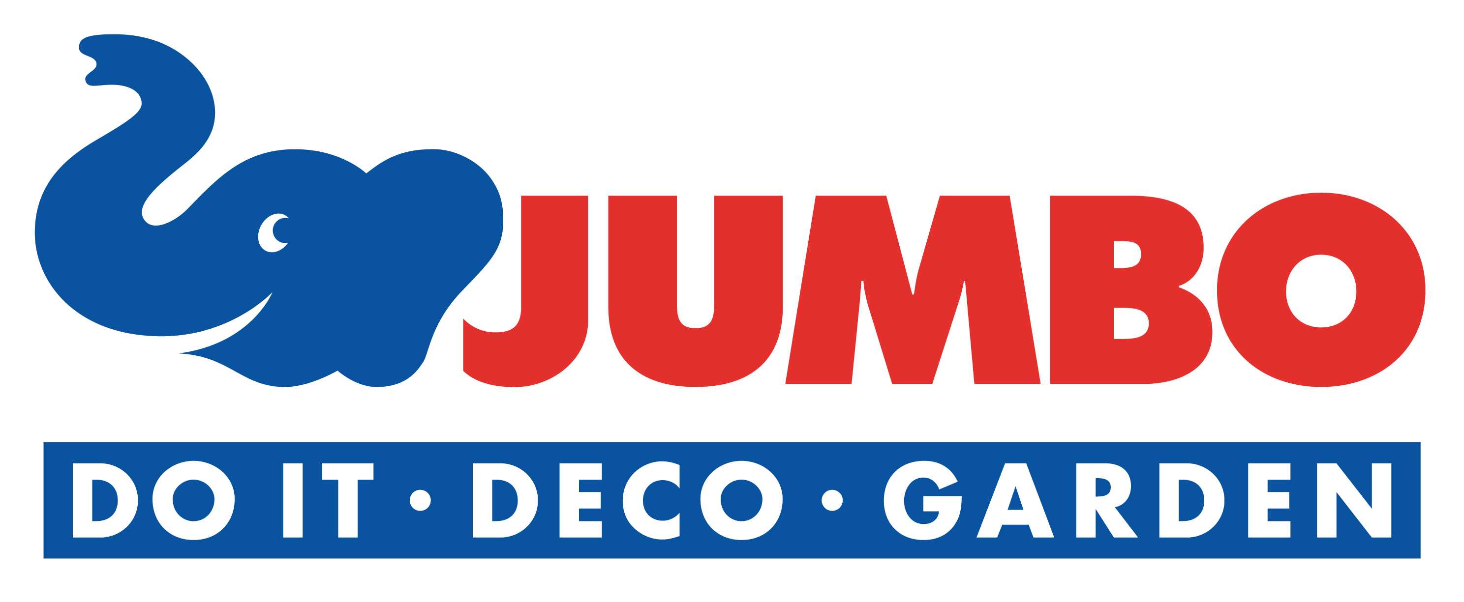 Die heutige Ergänzung mit «DO IT – DECO – GARDEN» betont die drei Haupttätigkeitsfelder des Unternehmens.